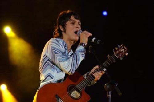 Piru Saez 2002